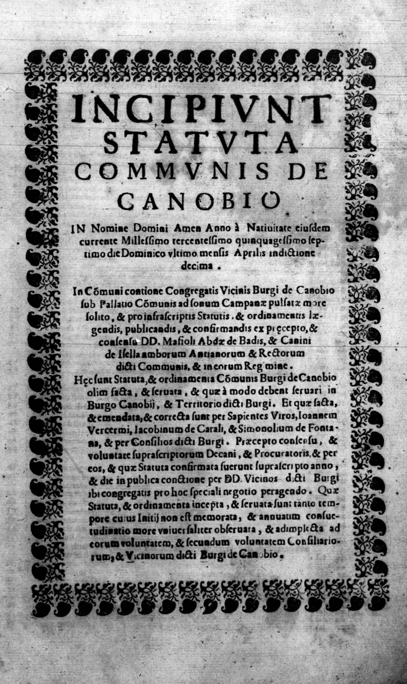 Frontespizio